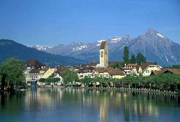 Stedtli Unterseen